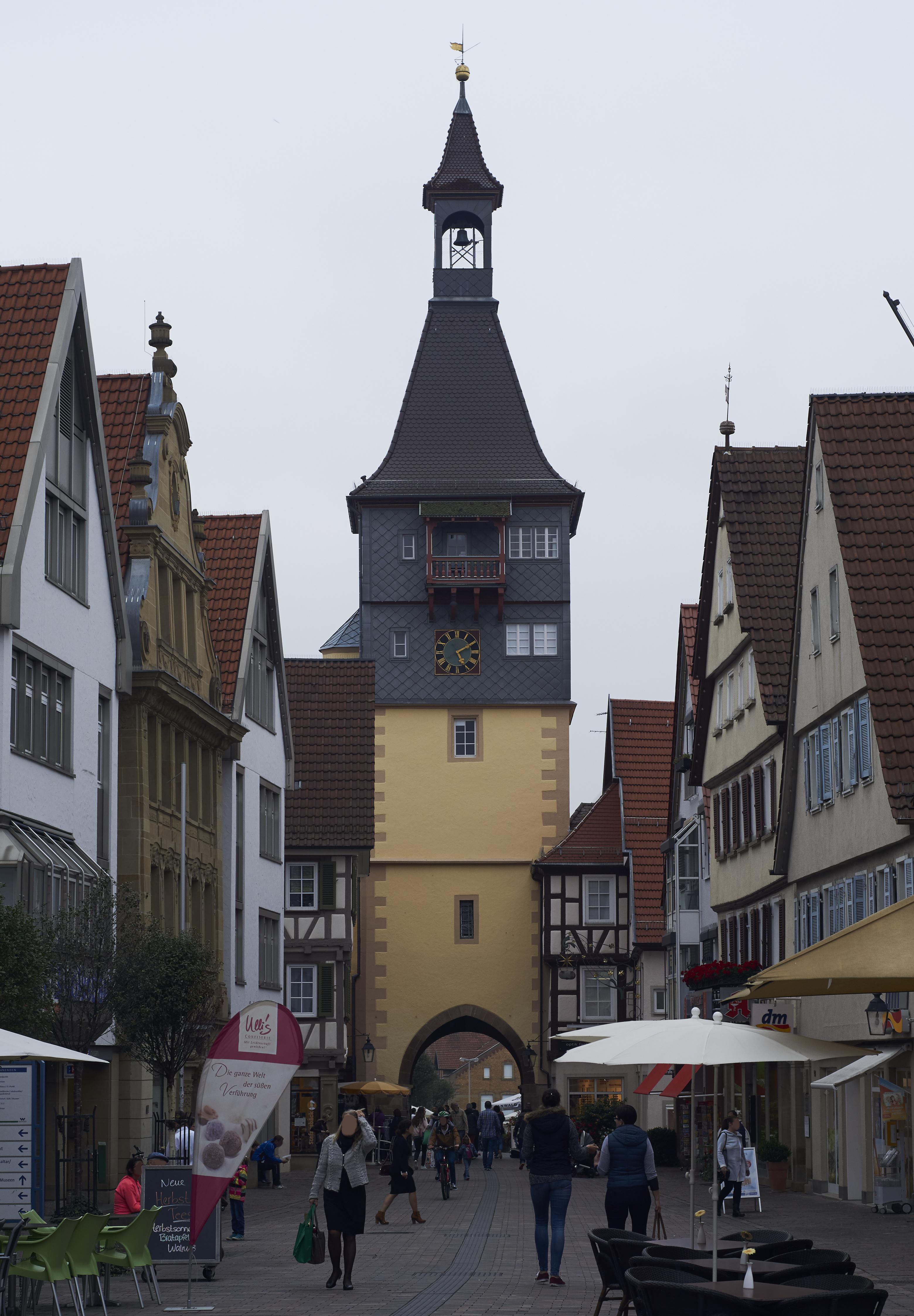 Torturm in der Marktstraße in Winnenden, von Osten gesehen